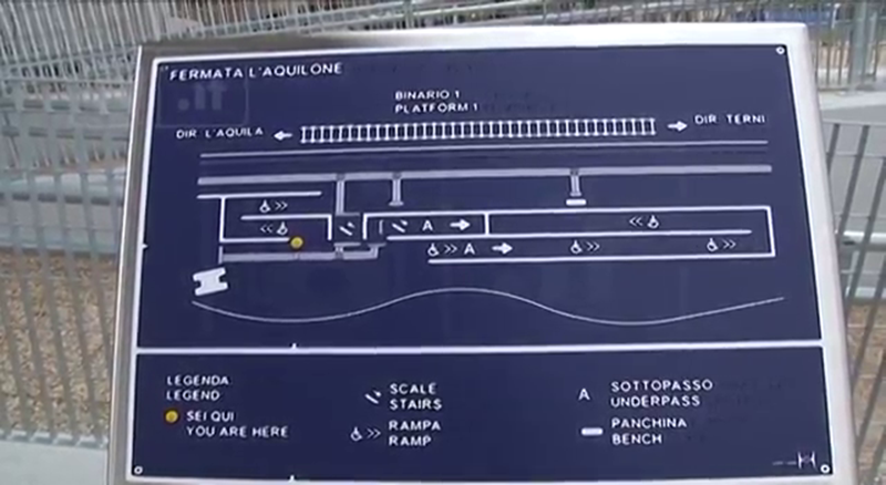 Cerimonia di inaugurazione delle due fermate ferroviarie di "Bazzano" e "L'Aquila Campo di Pile" - L'Aquila, 11 dicembre 2017